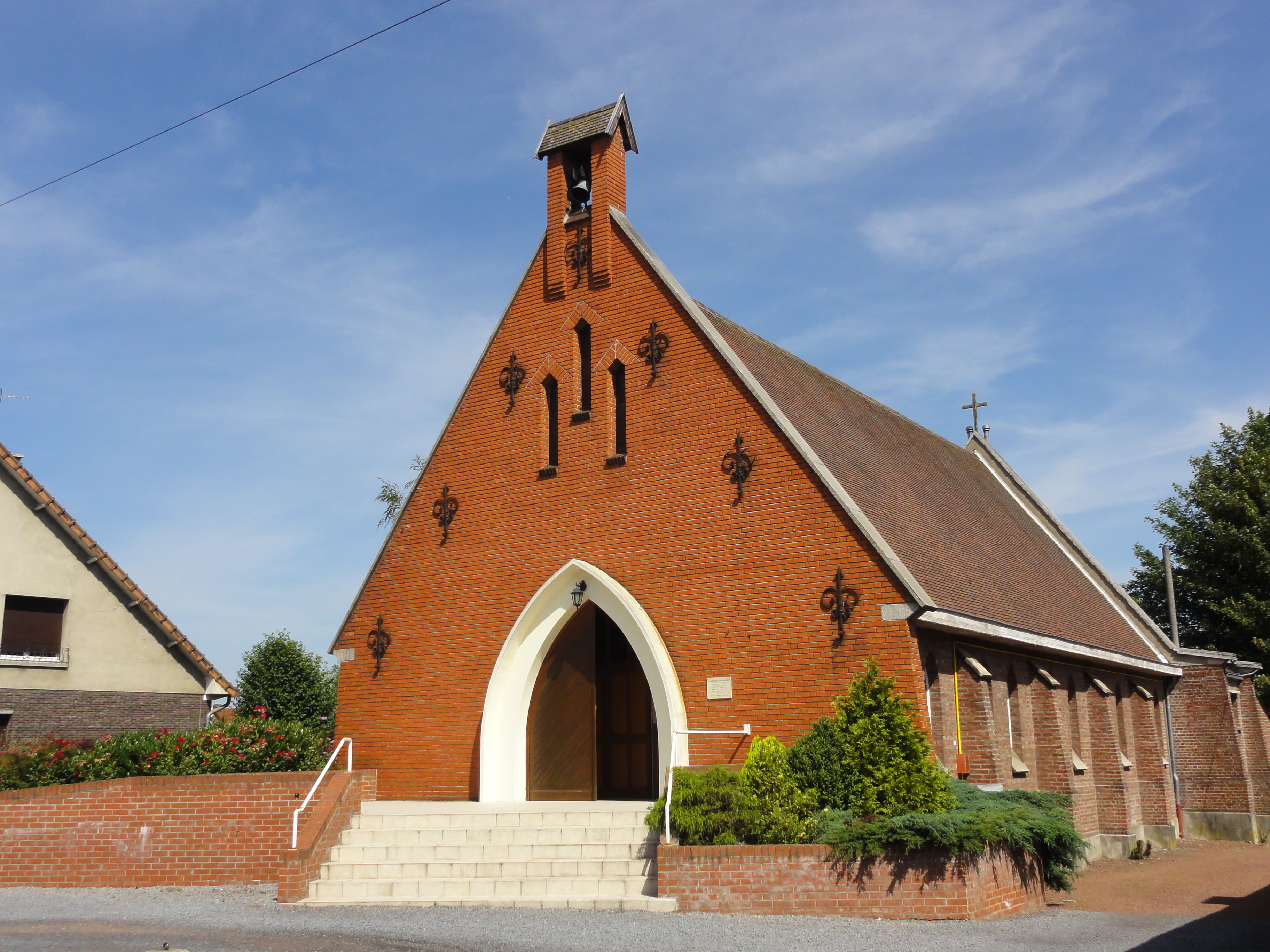 Chapelle Sainte-Rita des cités de la Fosse n° 9 de la Compagnie des mines de l'Escarpelle, Roost-Warendin, Nord, Nord-Pas-de-Calais, France.